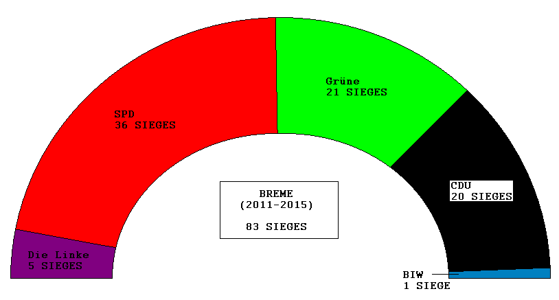 Elus de Brême en 2011 lors des élections régionales de Brême en 2011, mandat courant jusque 2015.